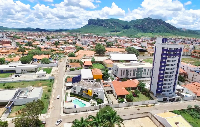 A Serra Talhada se destaca no horizonte em meio à Depressão Sertaneja.